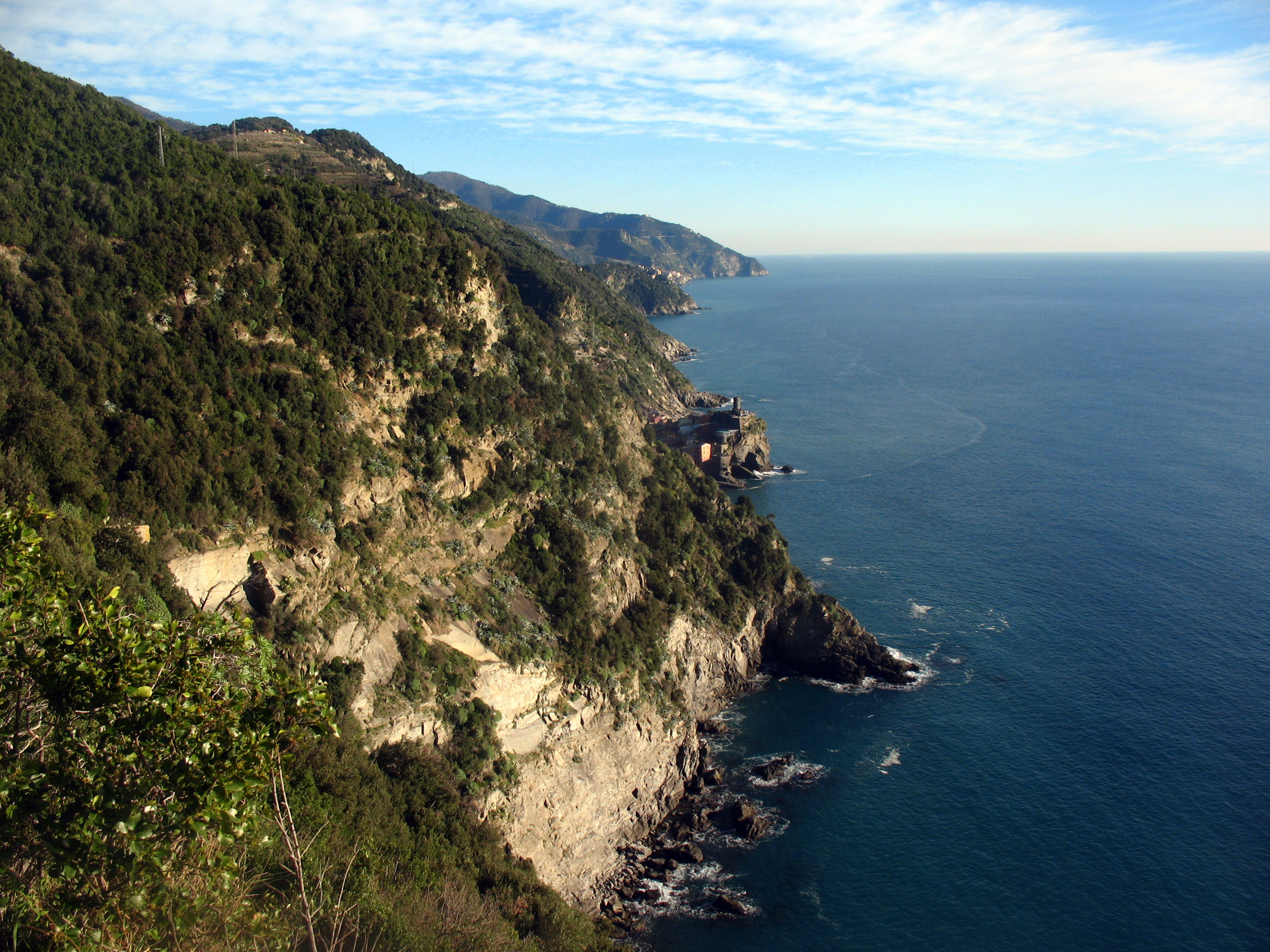 Ривьера Специи. Чинкве-Терре.